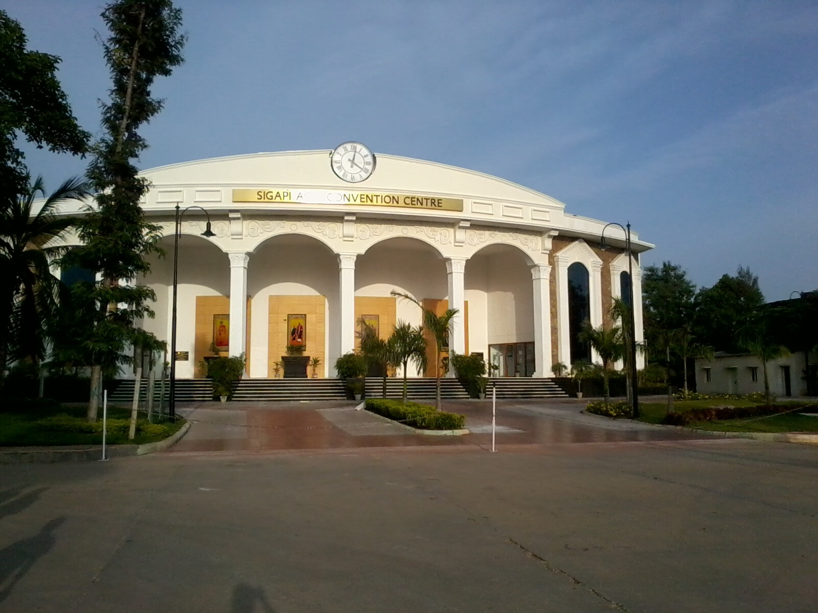 Sigapiachi Convention Centre